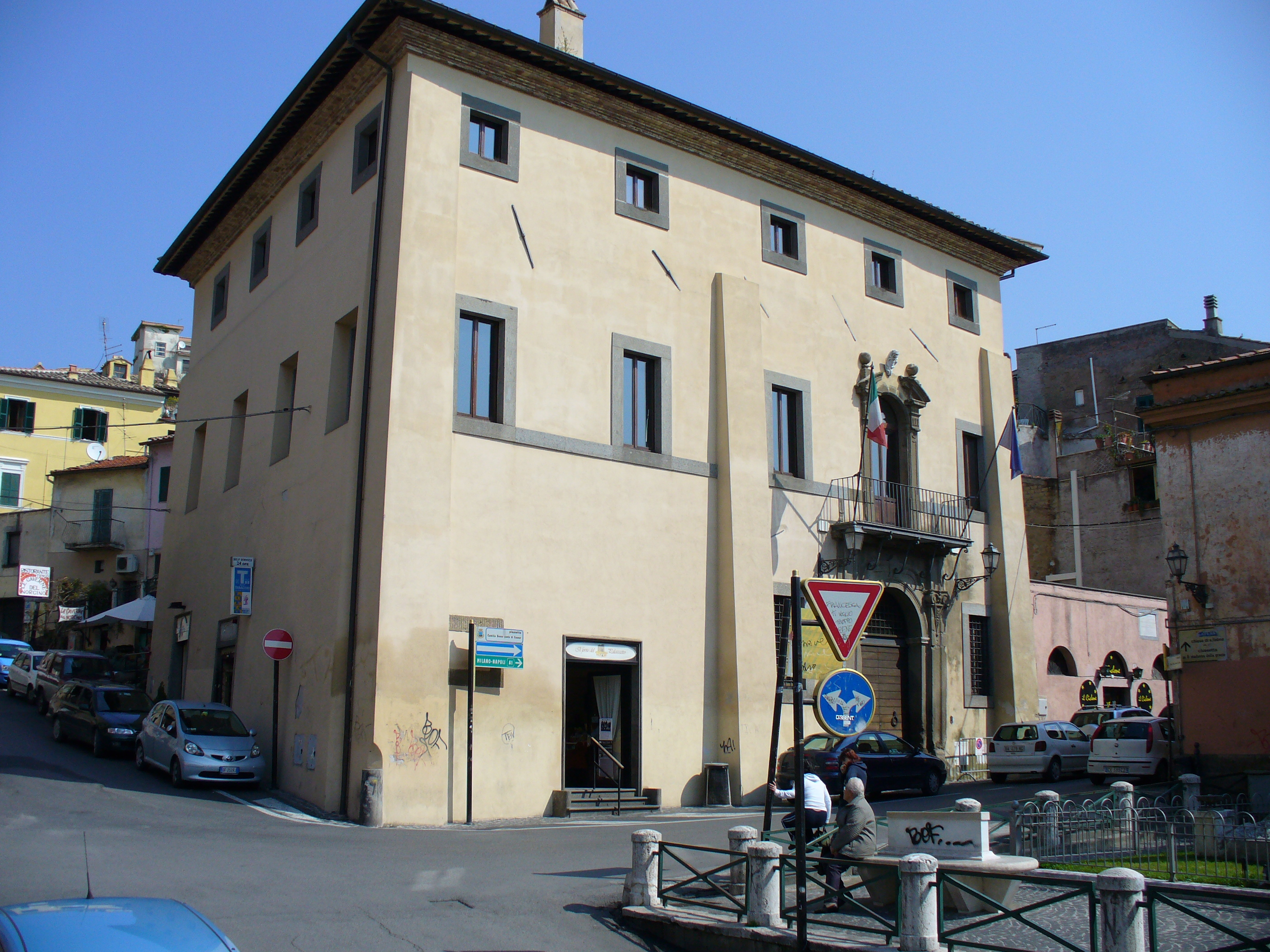 Morlupo (RM) - Palazzetto Borghese